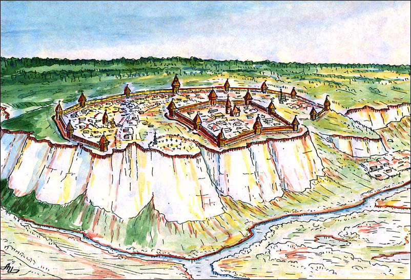 Белгородская крепость. XVII век. Реконструкция А. И. Ильина.